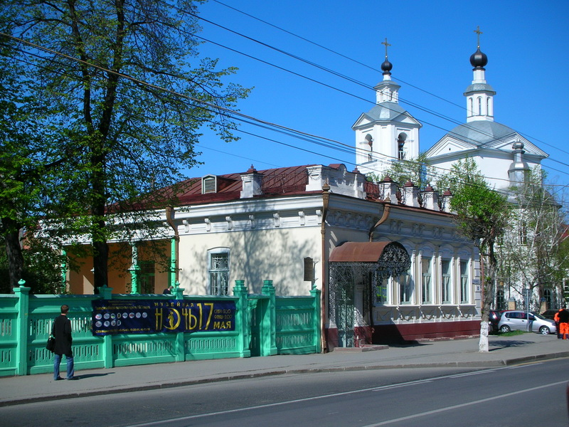 Дом-музей Машарова (г. Тюмень, ул. Ленина, 24)